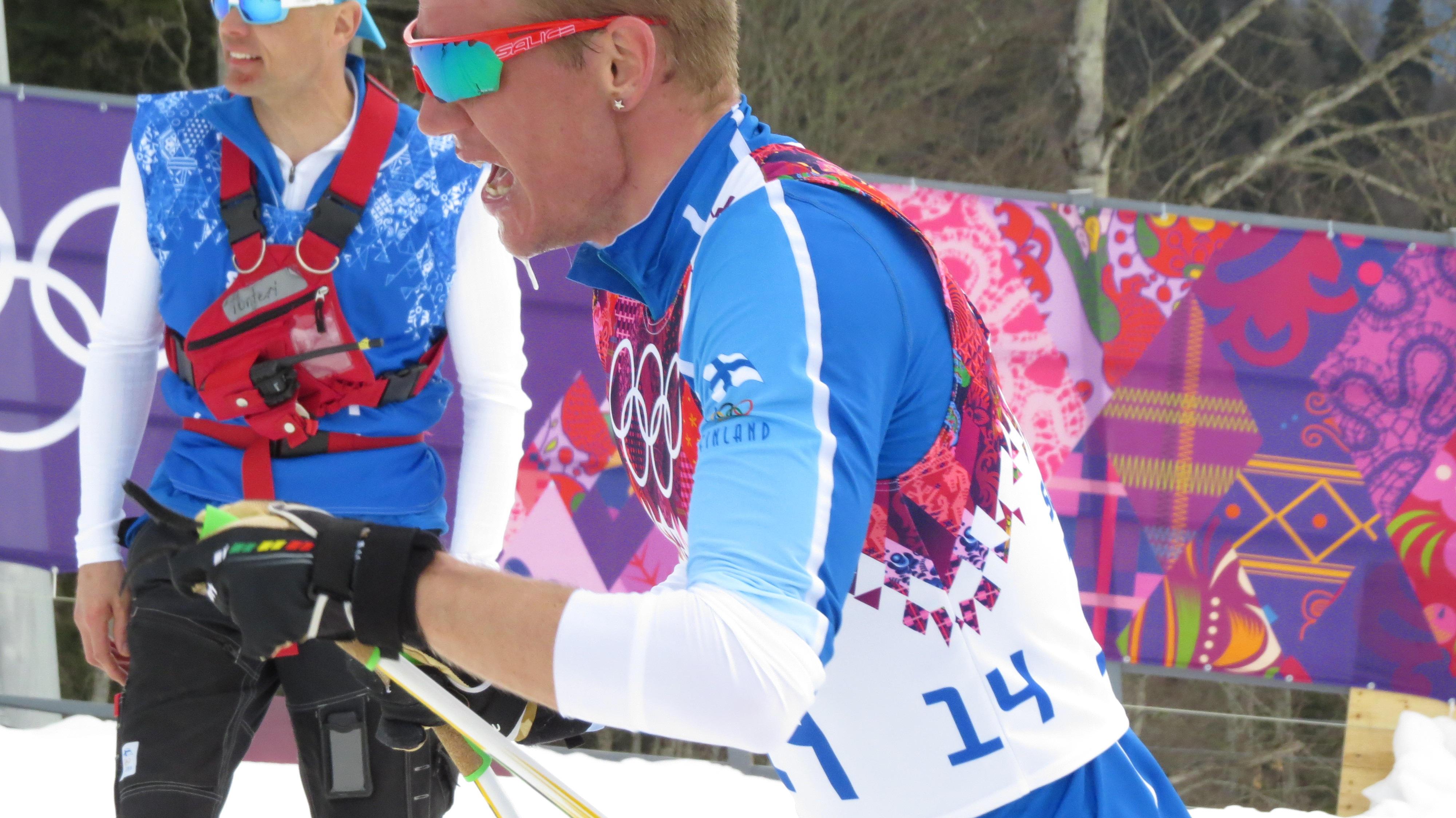 Лыжные гонки на зимних Олимпийских играх 2014 — 15 км классическим стилем (мужчины)